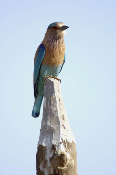 Rollier indien Coracias benghalensis